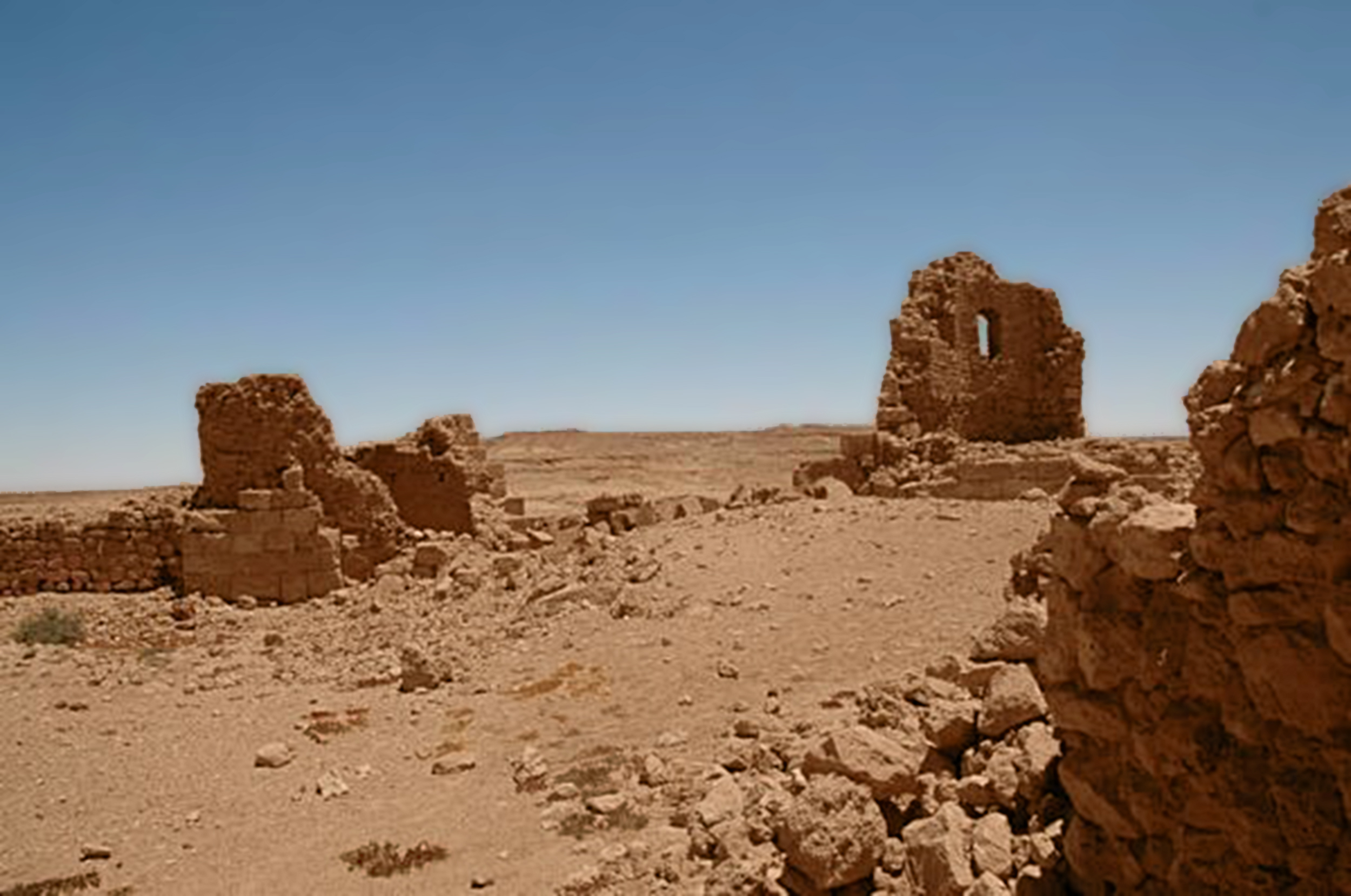 Kastell Gheriat el-Garbia - Die Porta praetoria vor dem Beginn der Ausgrabungen im Jahr 2006. Blick aus dem Kastellinneren von Westen auf die Torzufahrt.